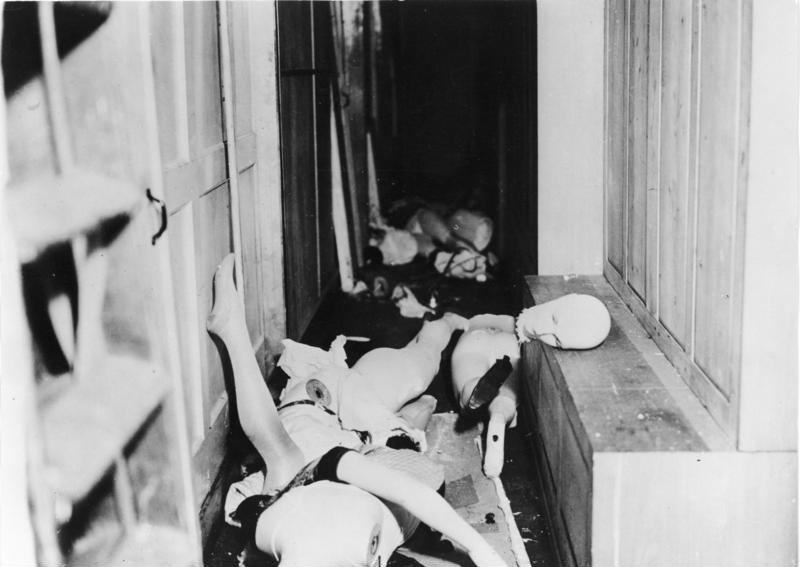 München, Kaufhaus Uhlfelder, Zerstörungen "Reichskristallnacht", Zerstörungen beim Kaufhaus Uhlfelder, 9.-10.11.1938 [München.- Reichspogromnacht / "Reichskristallnacht".- Zerstörungen im Kaufhaus Heinrich Uhlfehlder GmbH]